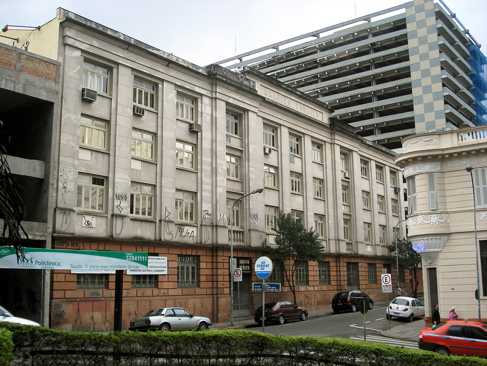 Fachada do Arquivo Público do Estado do Rio Grande do Sul, Porto Alegre, Brasil.